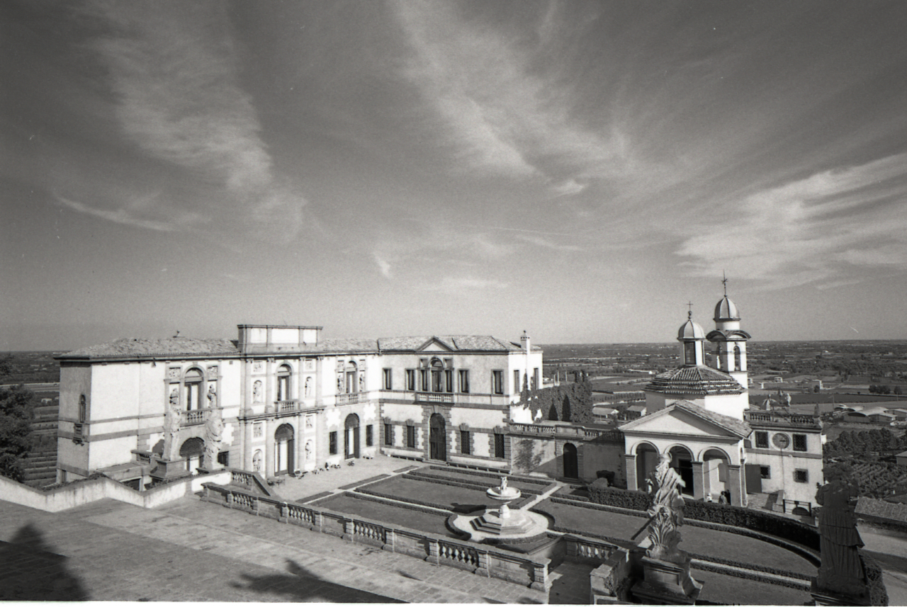 Servizio fotografico : Monselice, 1967 / Paolo Monti. - Strisce: 7, Fotogrammi complessivi: 34 : Negativo b/n, gelatina bromuro d'argento/ pellicola ; 35 mm. - ((I fotogrammi hanno una doppia numerazione. . - Sul portanegativi: Leica M Adox 21. - Fonte: Agenda: Monti/ 3 aprile 1966 - 9 marzo 1971/ 12421-16823 (1966-1971), presso Archivio Paolo Monti